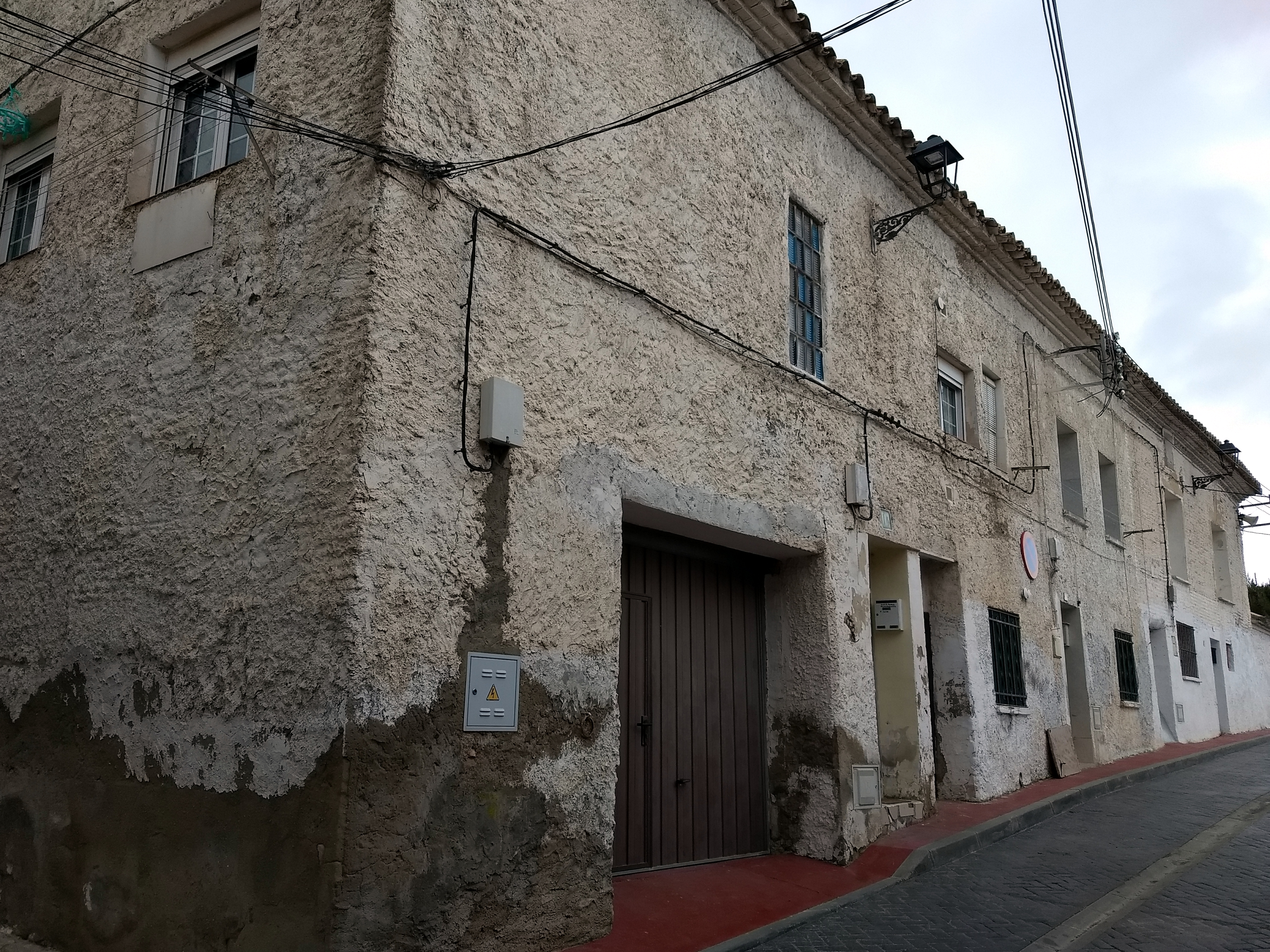 Aragonés: antiga Sinoga de Magallón